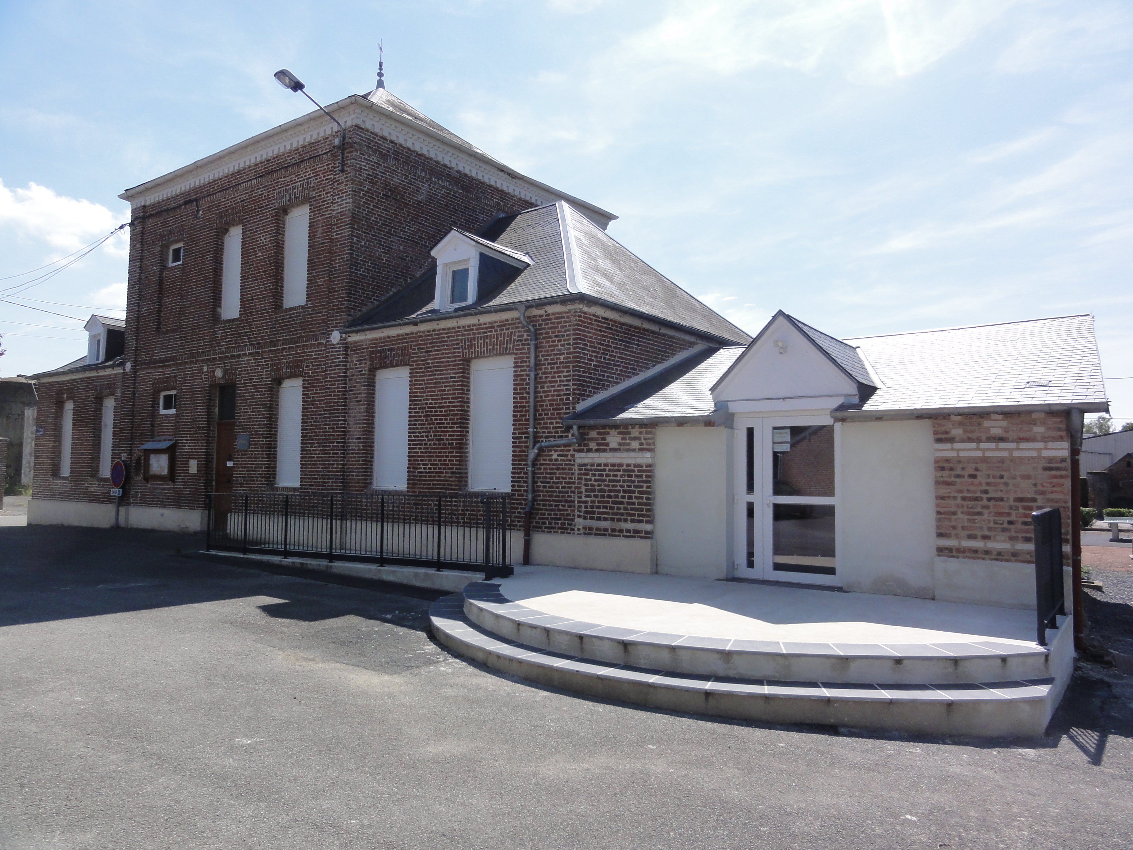 Villers-le-Sec (Aisne) mairie